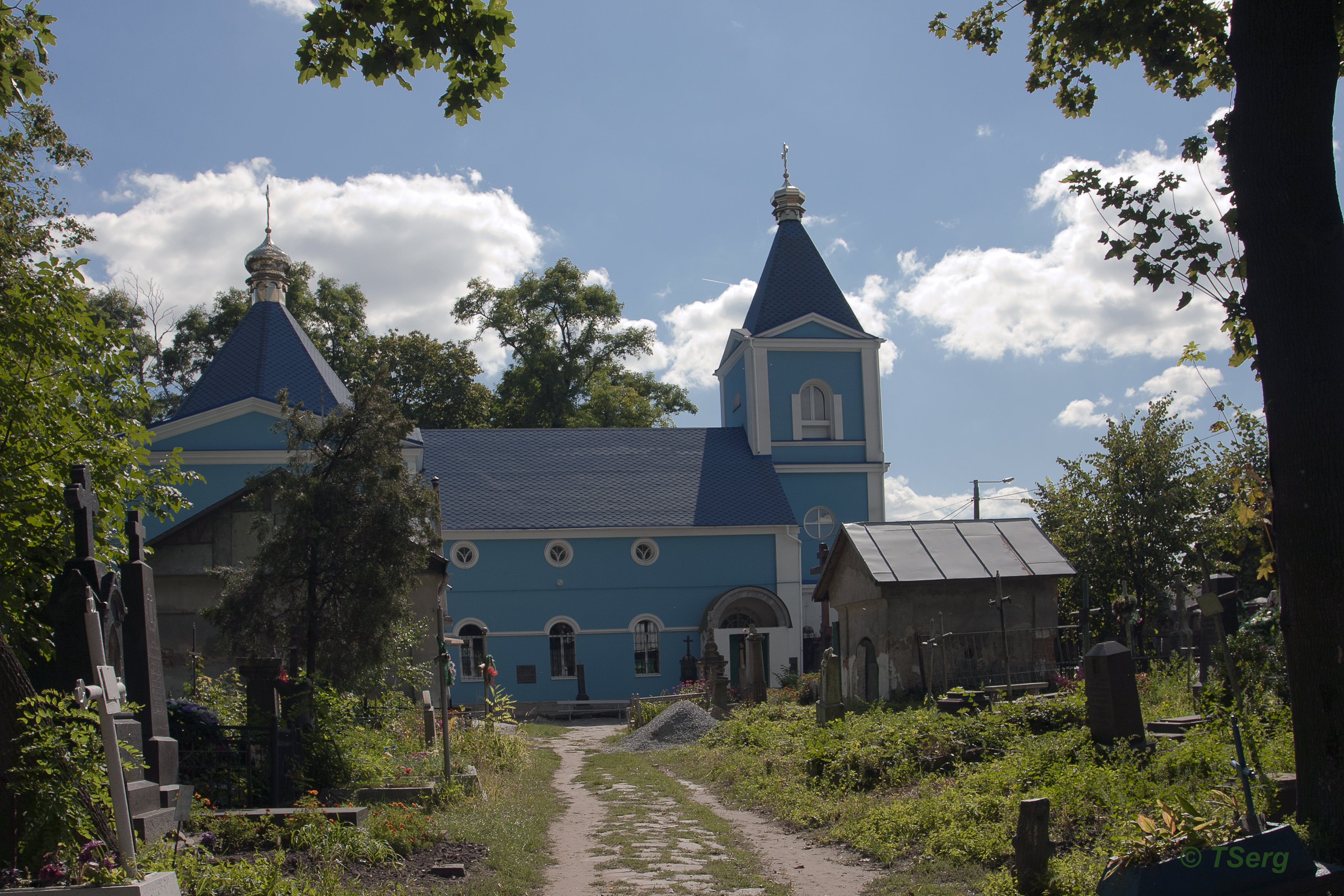 Церква Св. Іакова, Житомир, вул. Перемоги, 74. Розташована на Руському (Вільському) цвинтарі Житомира. Церква освячена и почала діяти у 1837 році. Перший кам"яний православний храм у м. Житомирі. Споруджена на місці захоронення тимчасового генерал-губернатора Волинського та Подільського Потьомкіна Якова Олексійовича на кошти та зха клопотанням його дружини Ольги Потьомкиної.. В подальшому декілька разів добудовувалась і розширювалась.